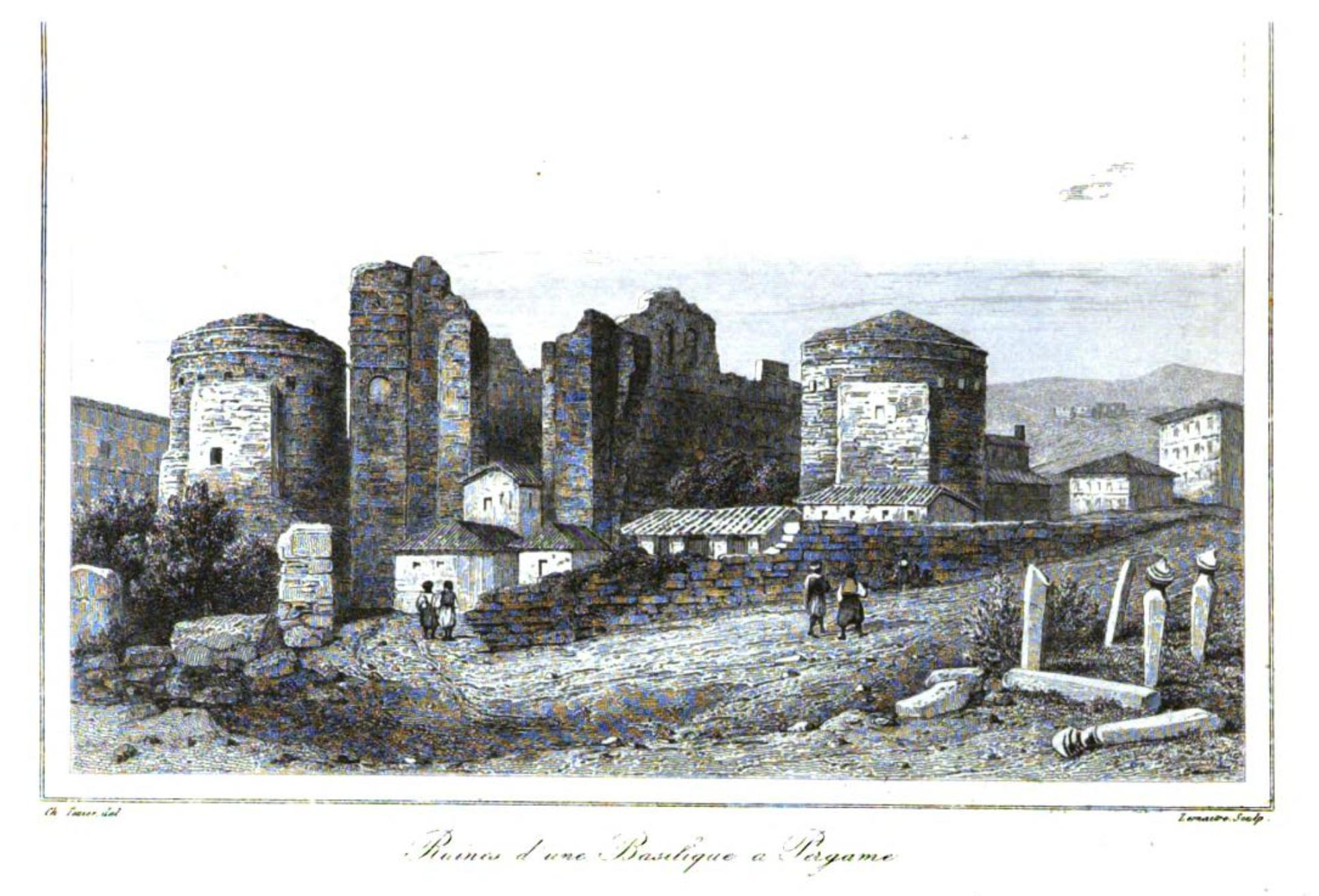 Rote Halle in Pergamon, Westtürkei, Zeichnung von Charles Texier